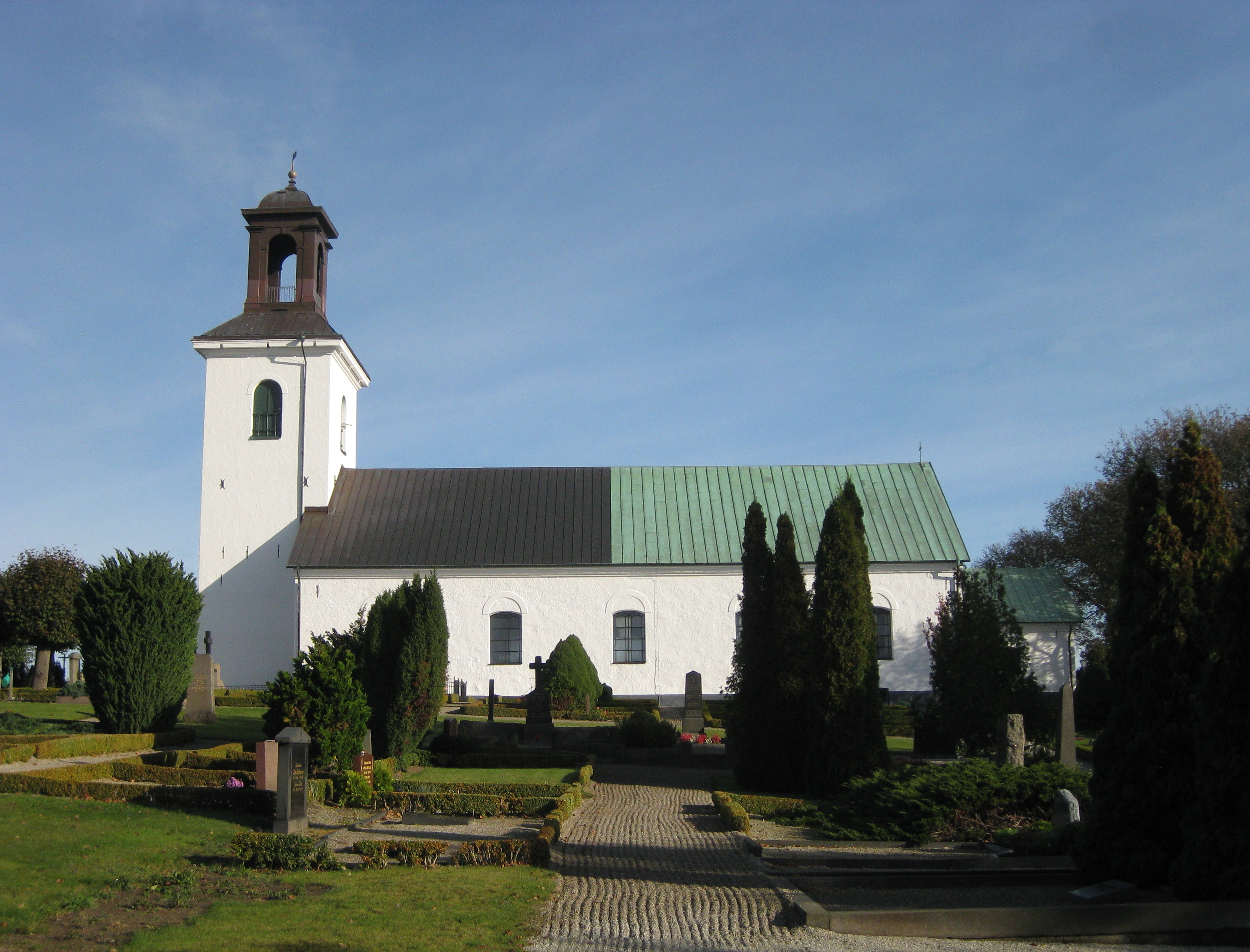 Västra Karaby kyrka